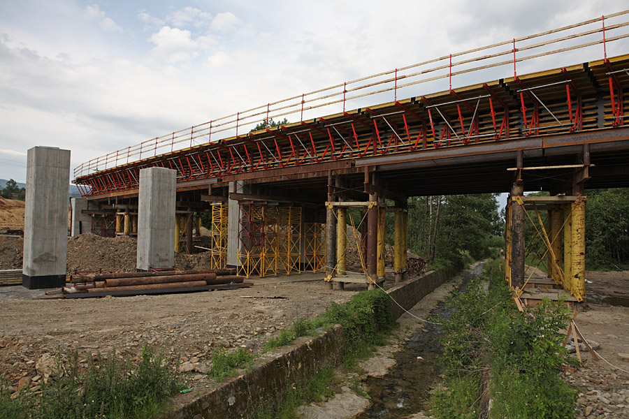 Budowa - Północno-Wschodnia Obwodnica Bielska-Białej (wiadukt nad ulicą Górską i potokiem Straconka.)